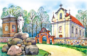 Паштовая картка з арыгінальнай маркай